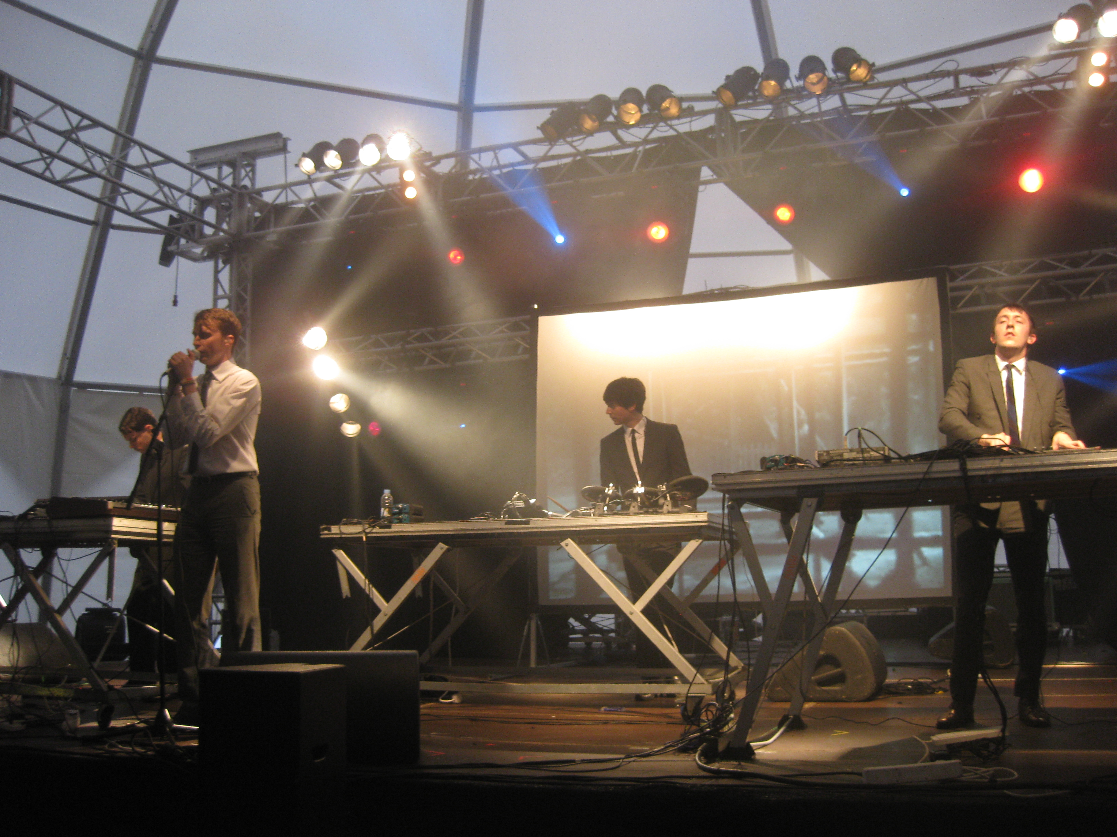 A banda Mirrors no Festival do Norte 2011, en Vilagarcía de Arousa.